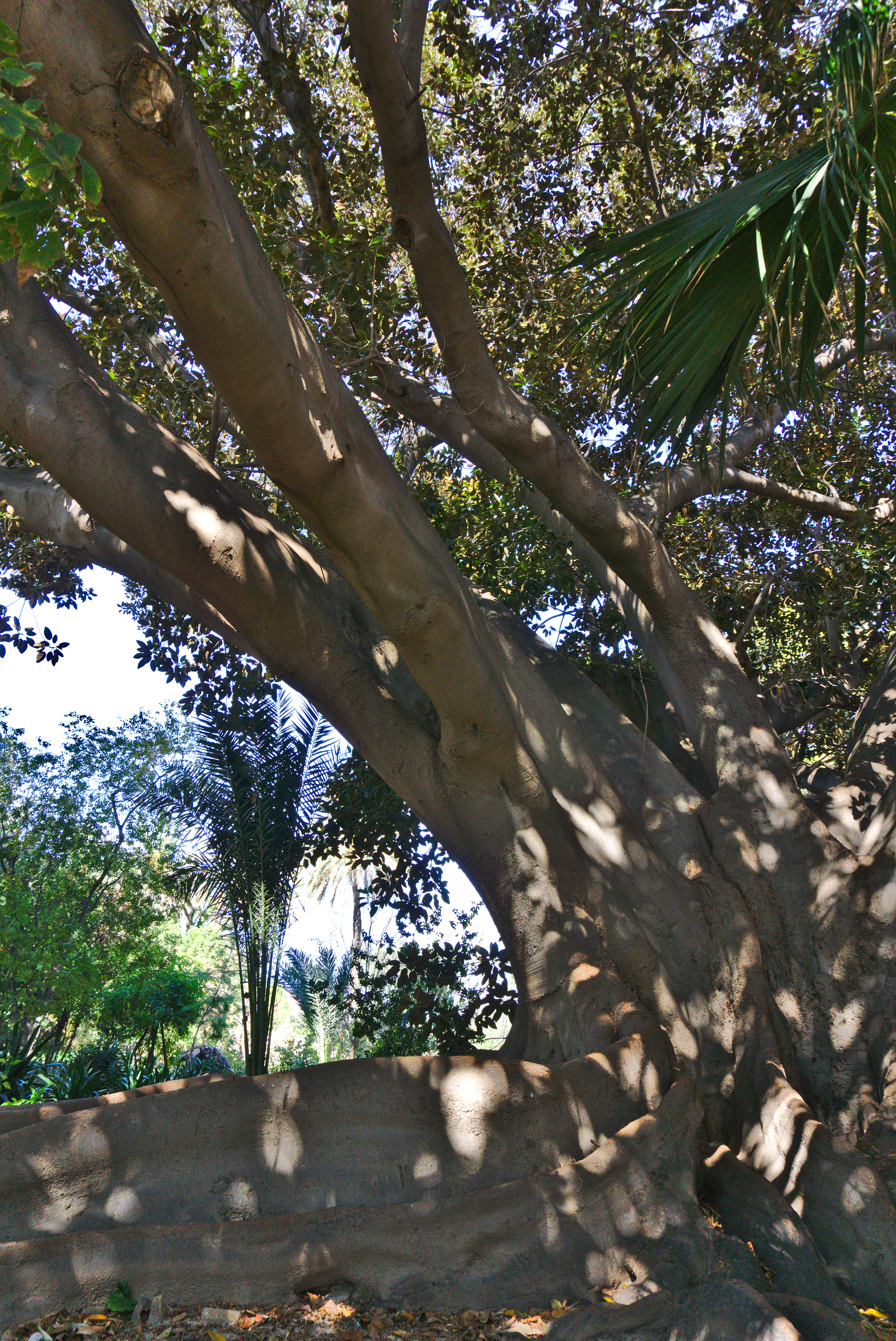 Ficus desde dentro del Jardín de la Finca Casa de Ferraz, con la propia casa donde está la Torre Ferraz al fondo. Se desconoce la edad exacta del ficus, pero se sabe que son más de 180 años.